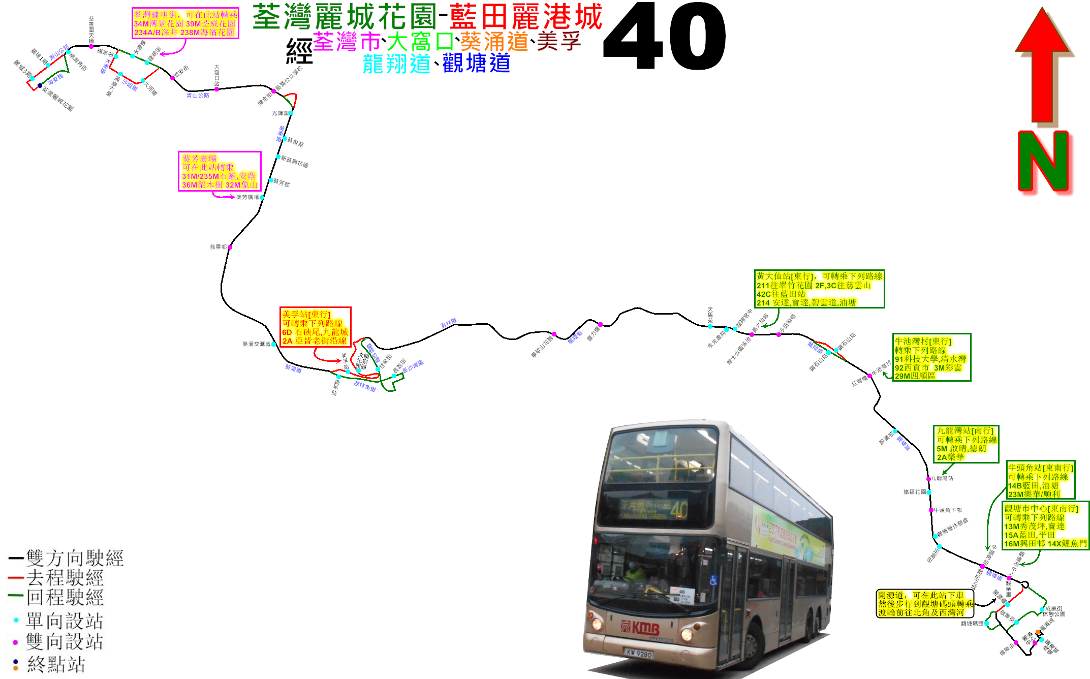 中文（香港）: 九巴40線的走線圖